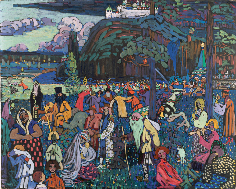 В. Кандинский. Красочная жизнь